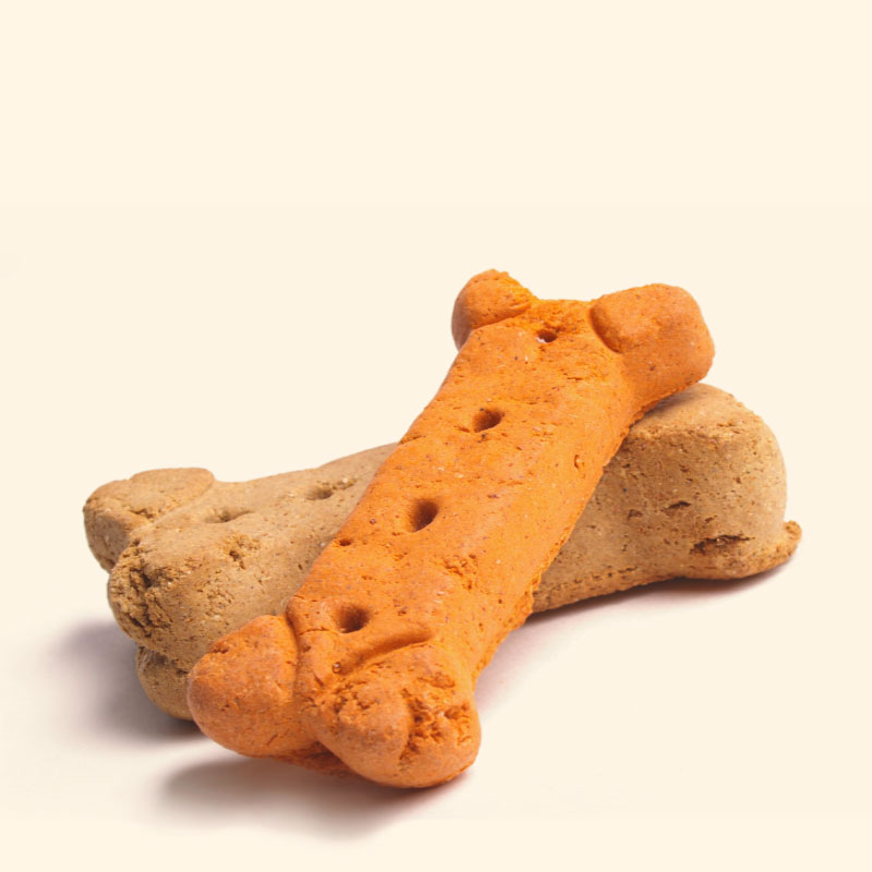 Mmmm, dog biscuits!